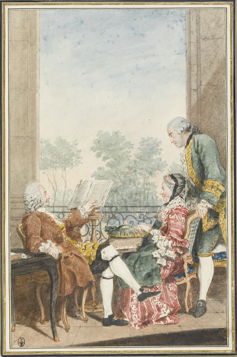 Monsieur et madame de la Chapelle, et monsieur de Lesseps, employé aux affaires étrangères